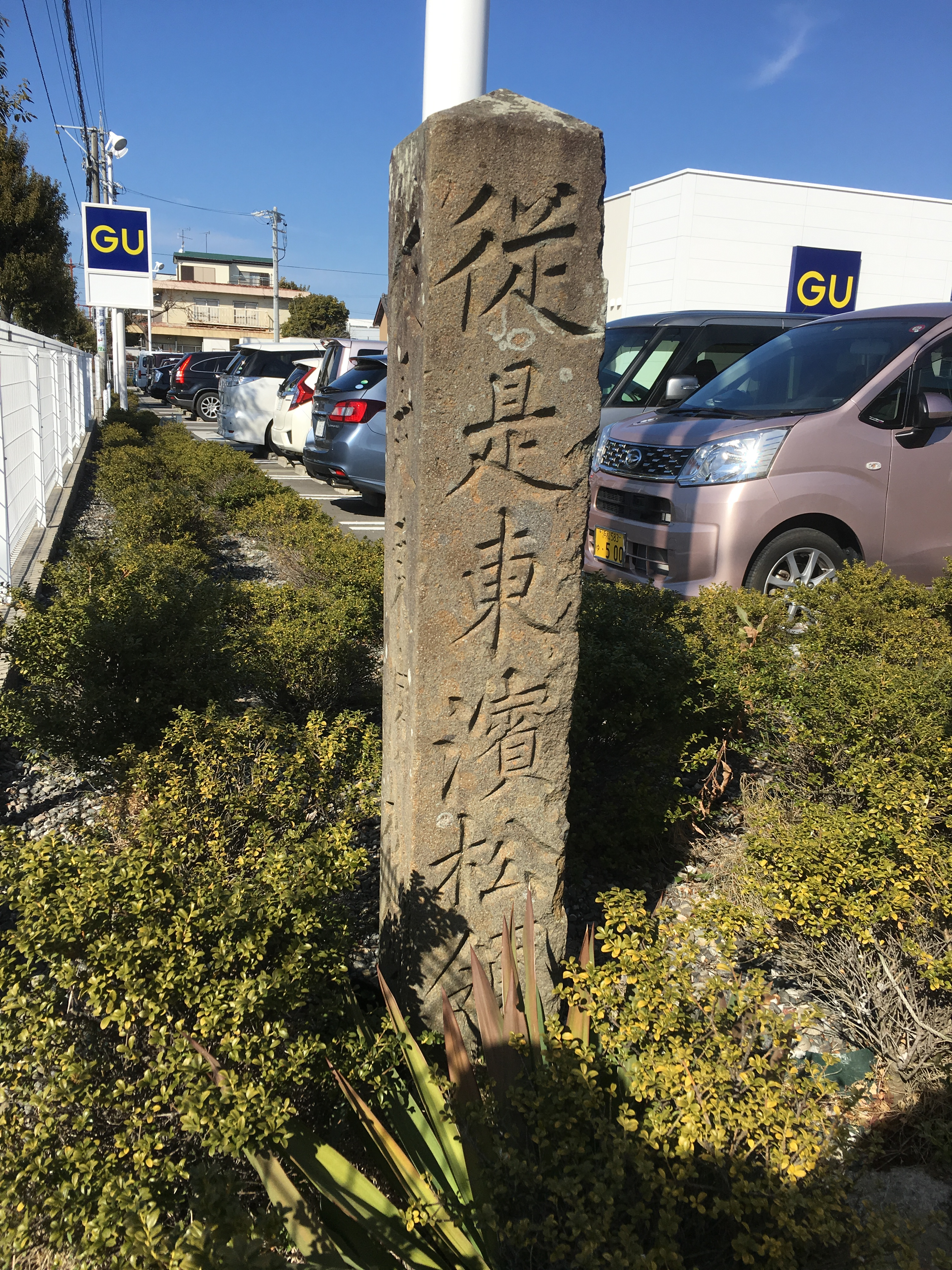 浜松藩の私領傍示杭（従是東浜松領）